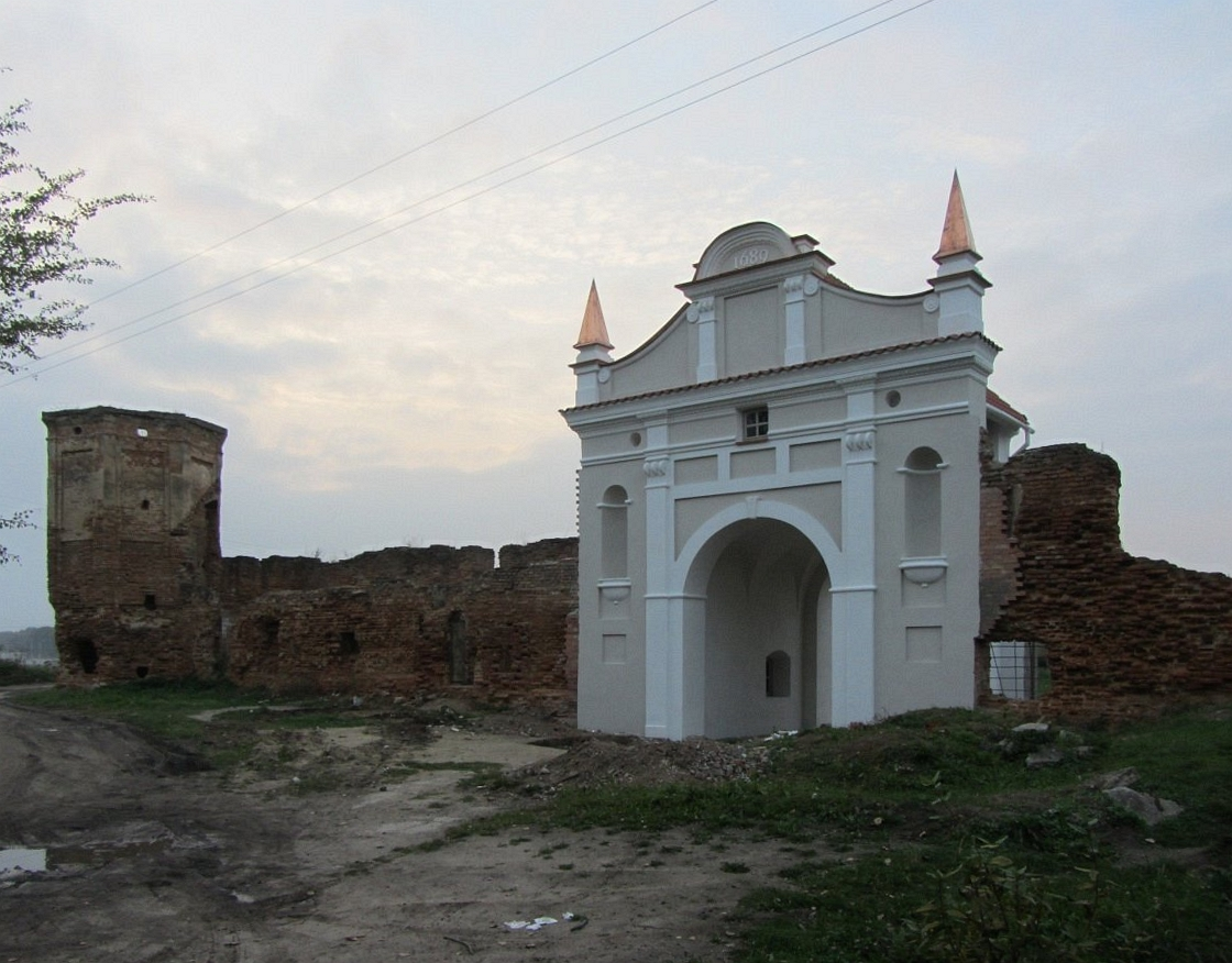 Бяроза. Кляштар